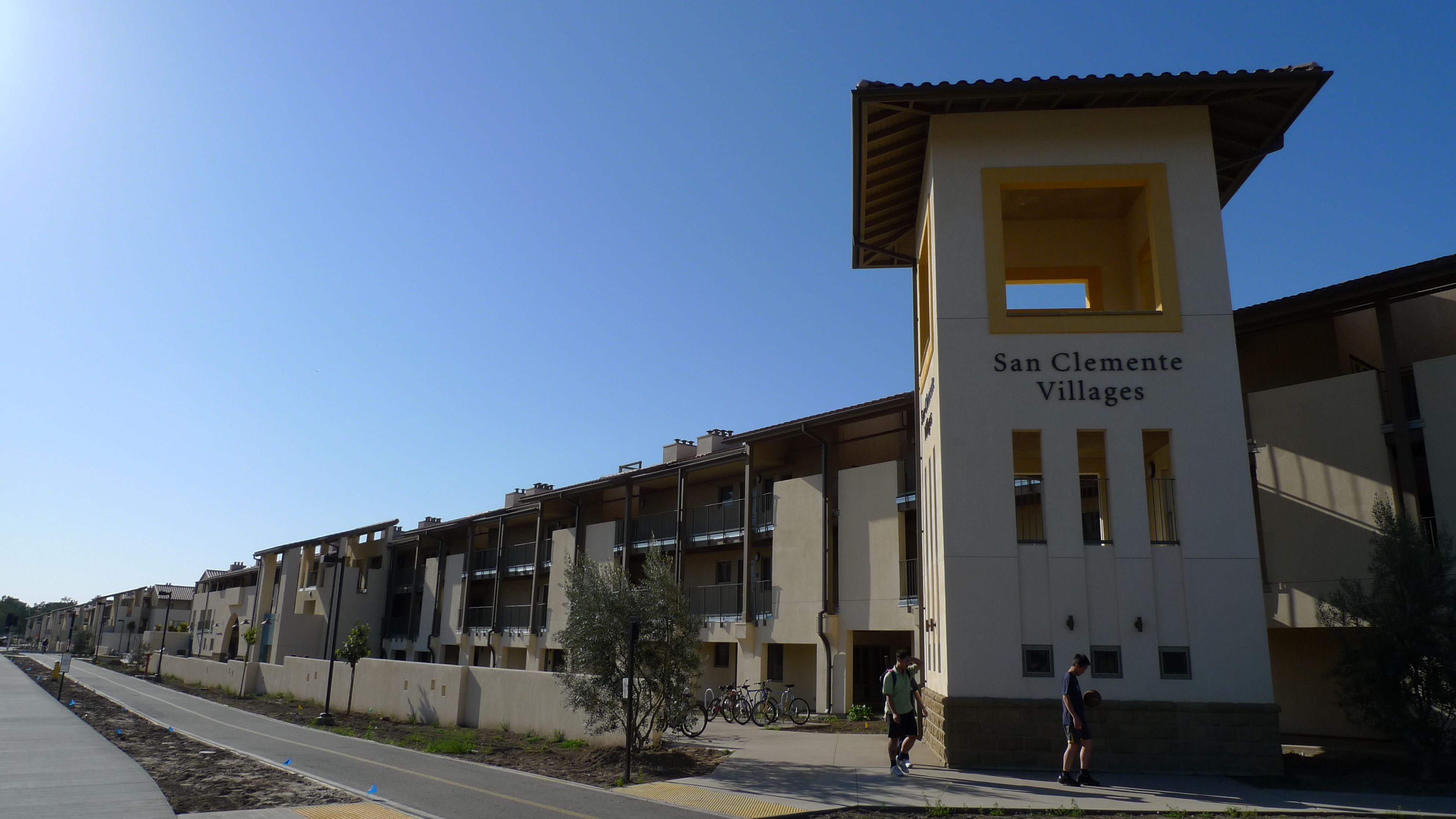 San Clemente Villages, April 2009.